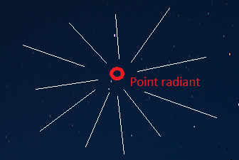 Schéma illustrant la position d'un radiant.